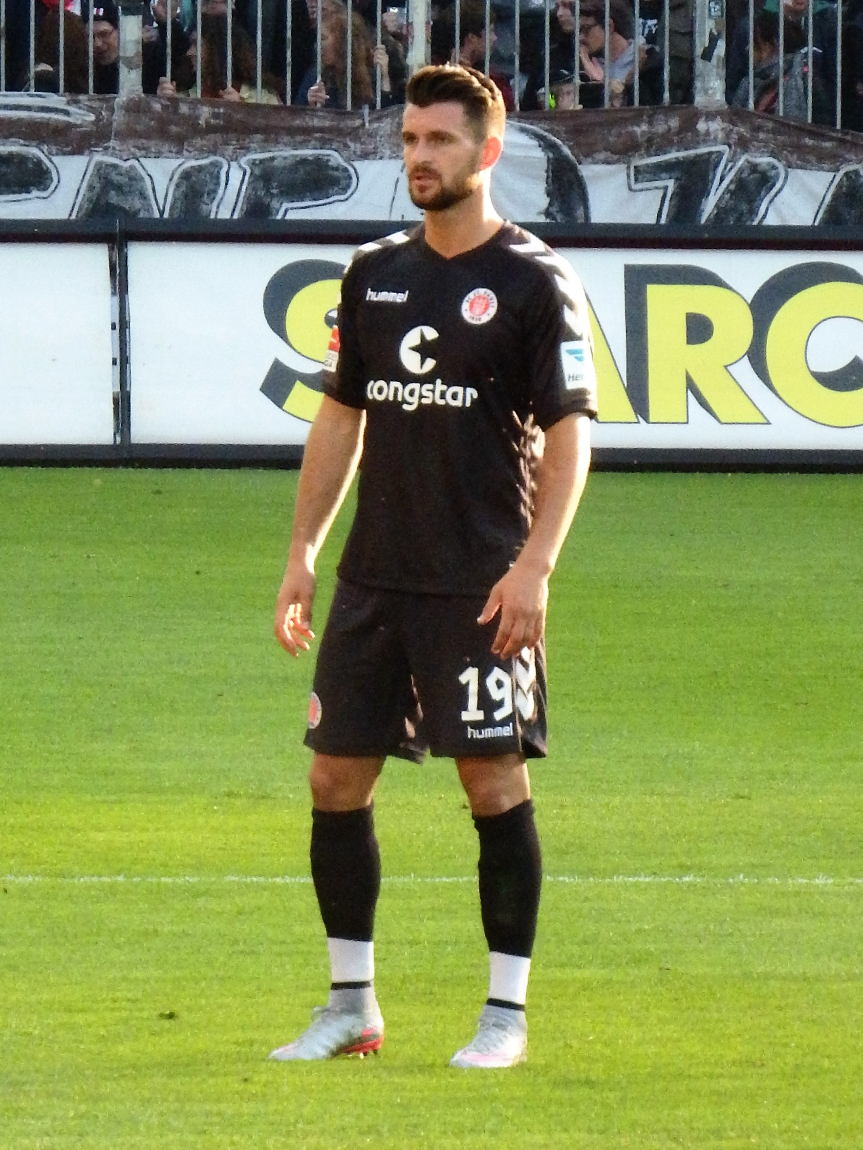 Enis Alushi beim FC St.Pauli